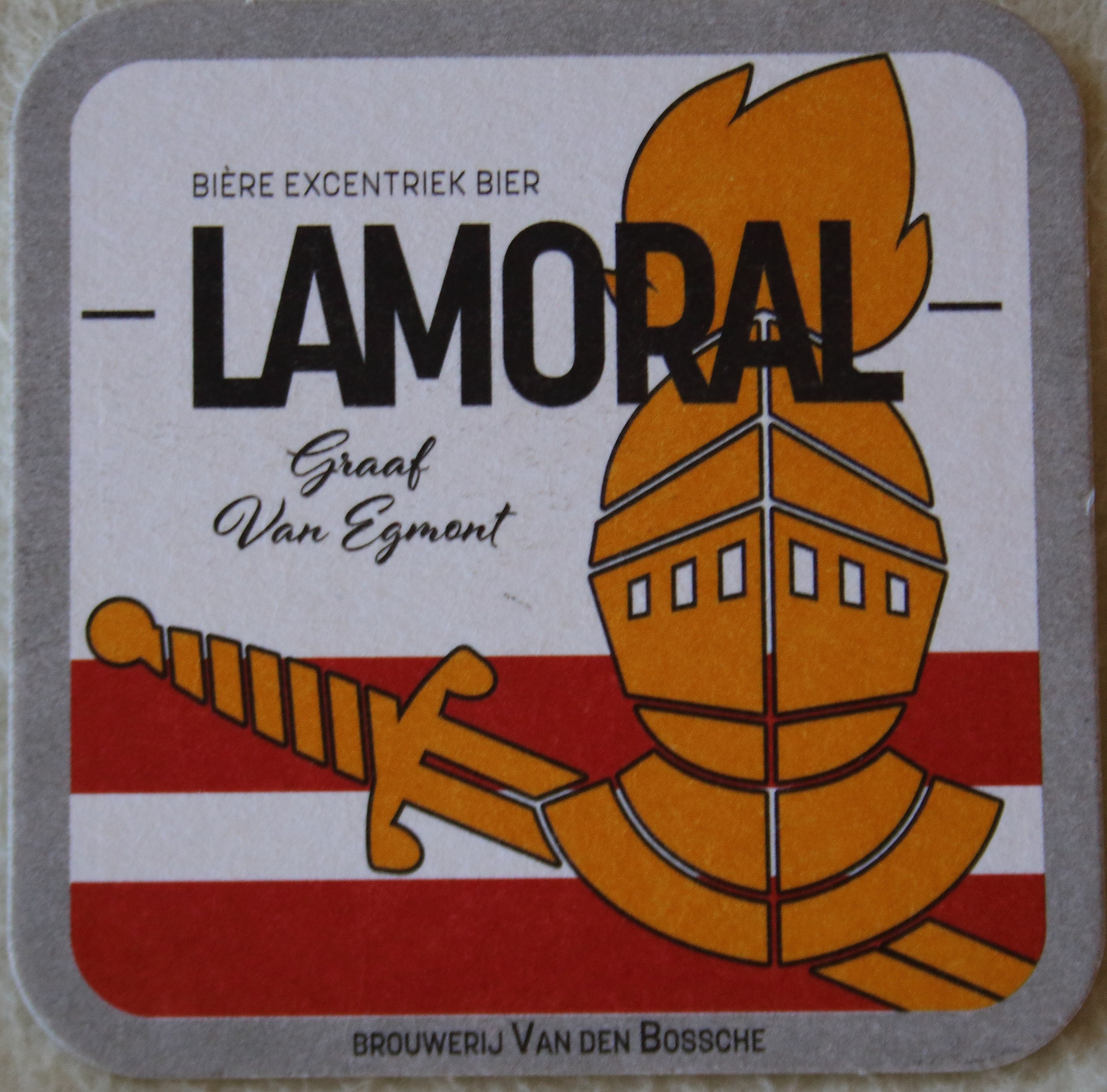 Bierviltje Lamoral Graaf van Egmont, Brouwerij Van den Bossche, Sint-Lievens-Esse, Herzele, Vlaanderen, België